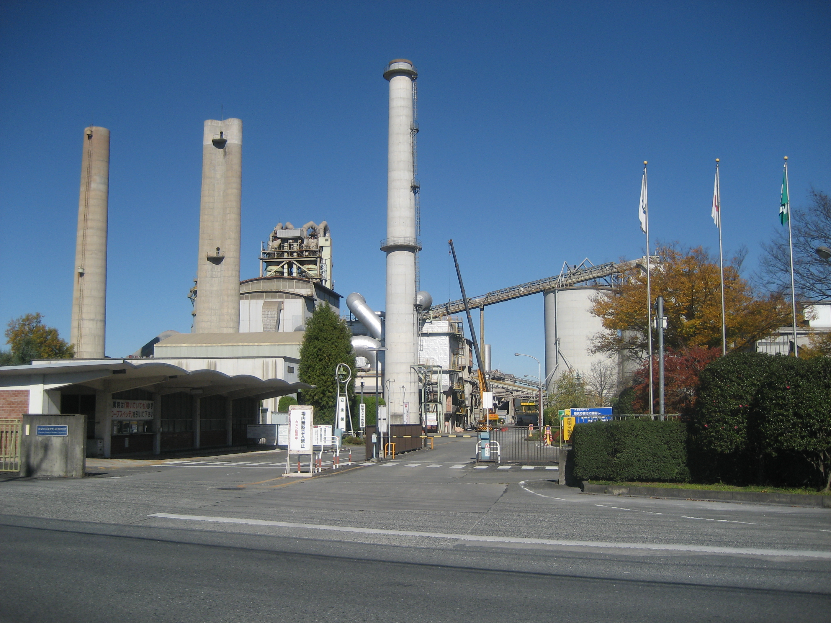 秩父太平洋セメント本社（入口付近を撮影）